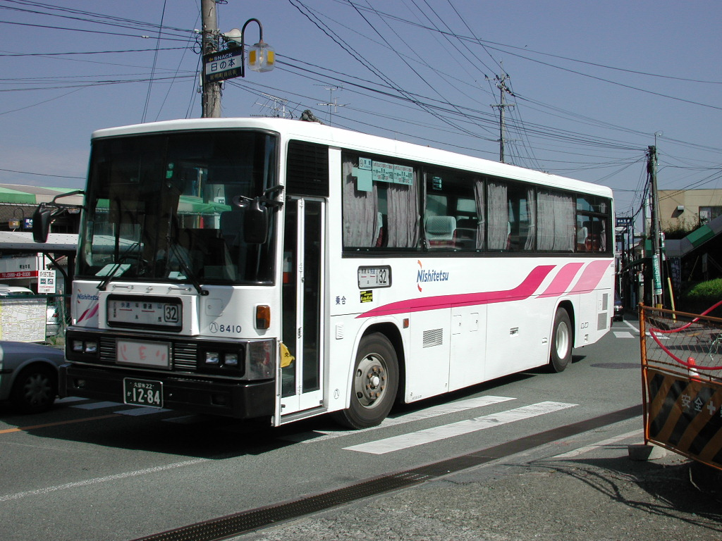 当時の車両 2001-7-21撮影